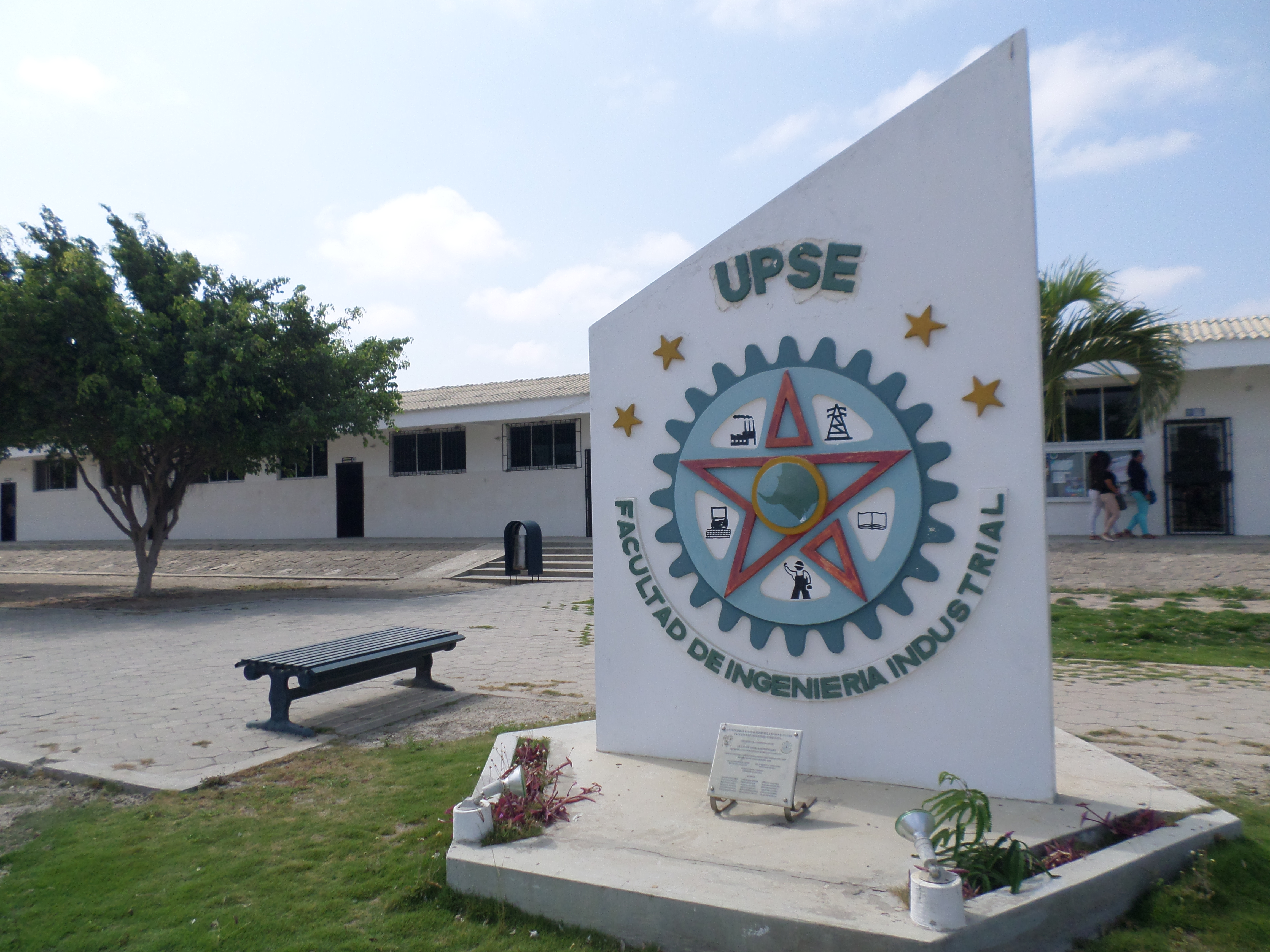 Facultad de Ingenieria Industrial